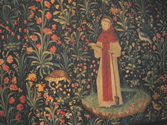 Tapisserie à fleurs et à monogramme reprsentant saint Antoine ermite (Tapisserie de Guigone de Salins), tissée en France, XVe siècle, hospices de Beaune, Bourgogne, France.